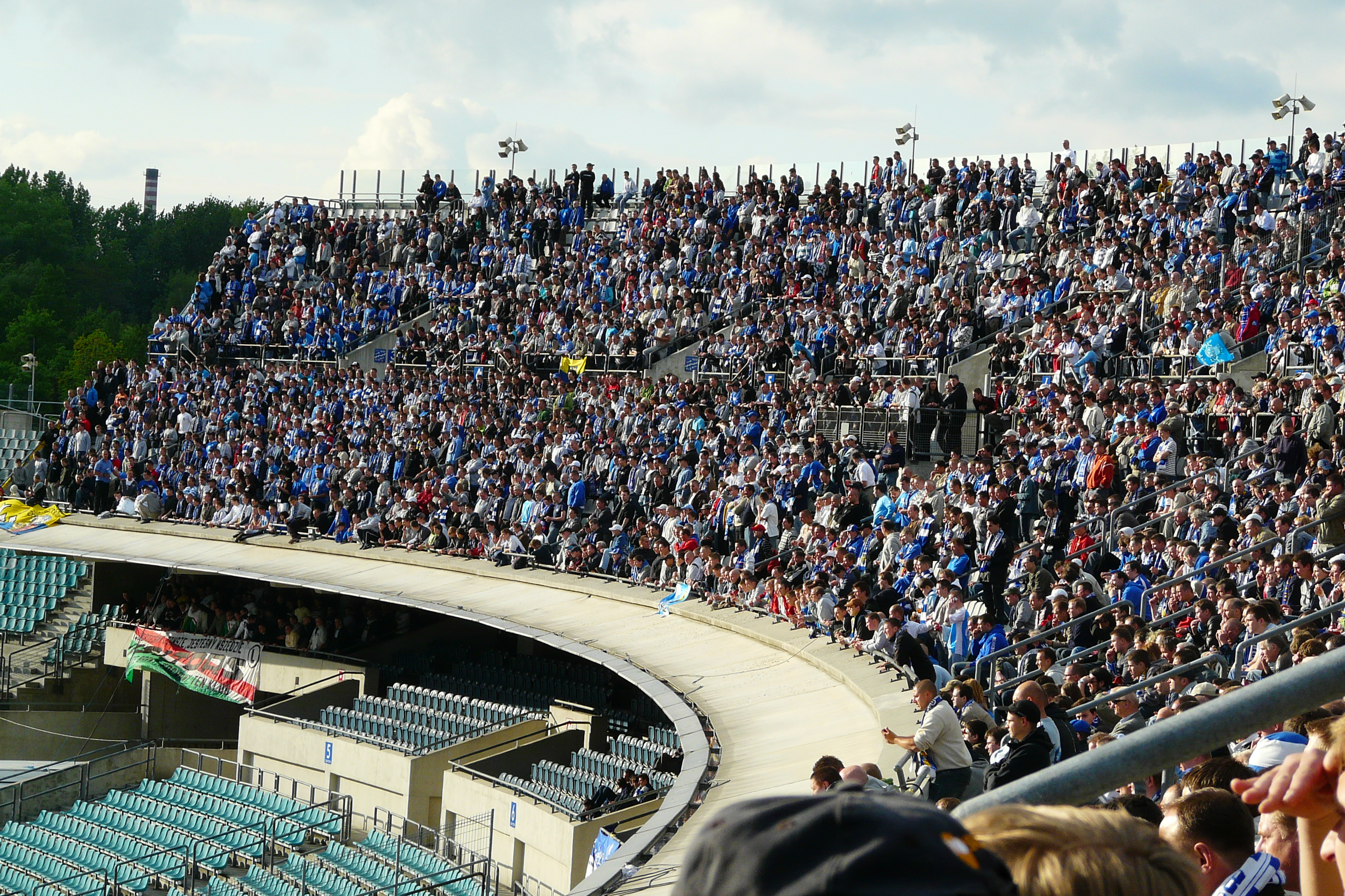 Kibice Ruchu w meczu z Legią Warszawa (półfinał PP) na Stadionie Śląskim